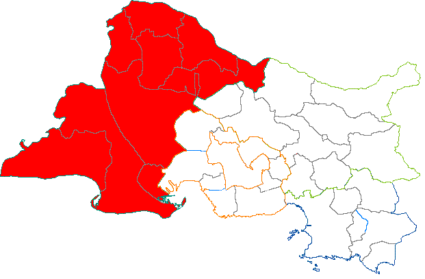 L'arrondissement d'Arles